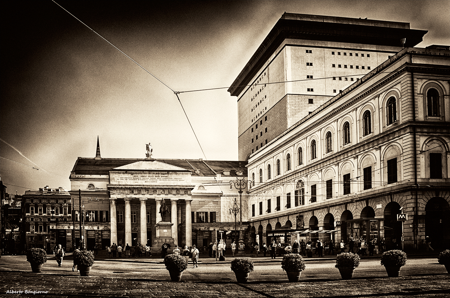 Teatro Carlo Felice This is a photo of a monument which is part of cultural heritage of Italy.